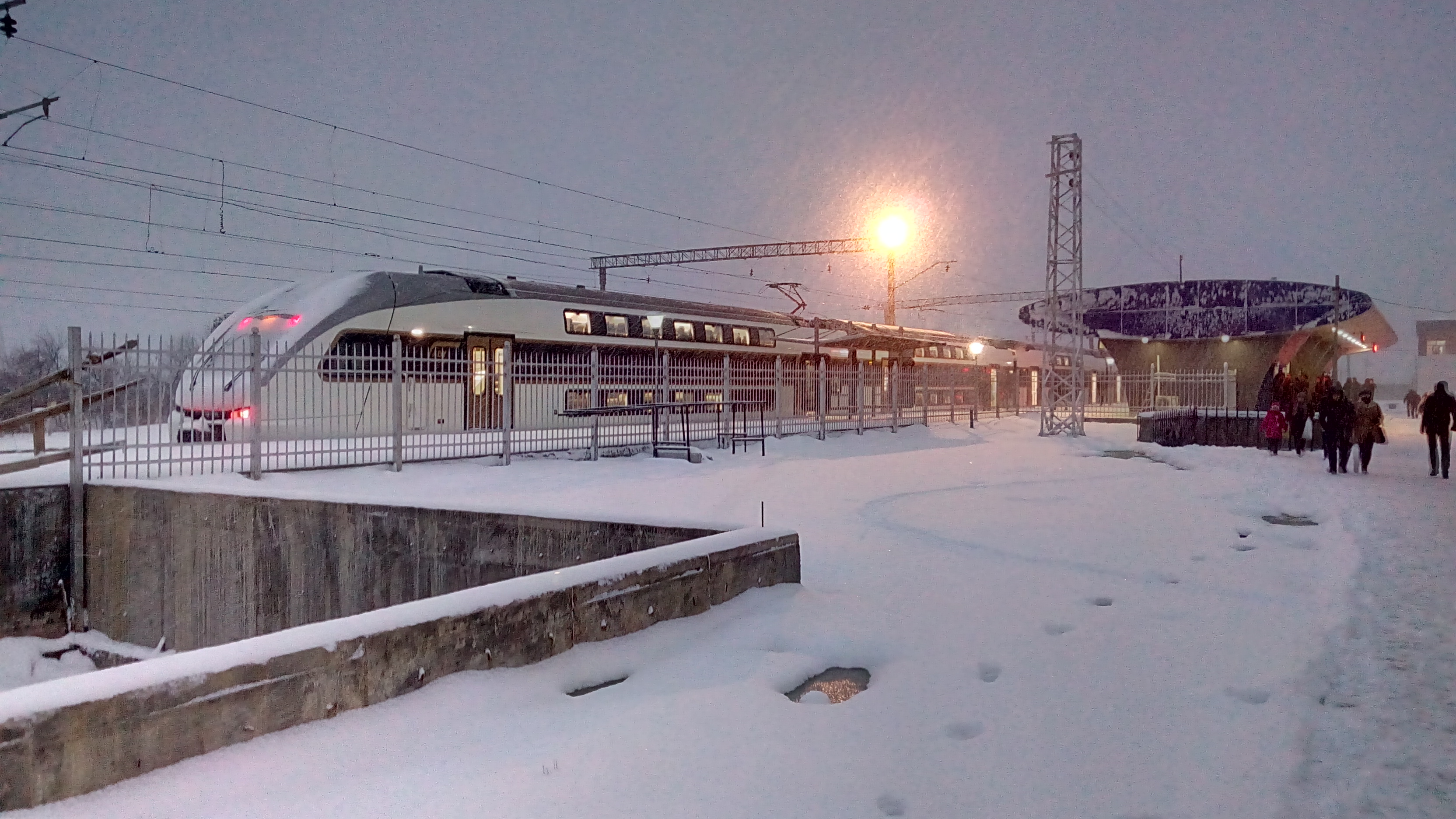 Bakı-Sumqayıt qatarı Sumqayıt vağzalında